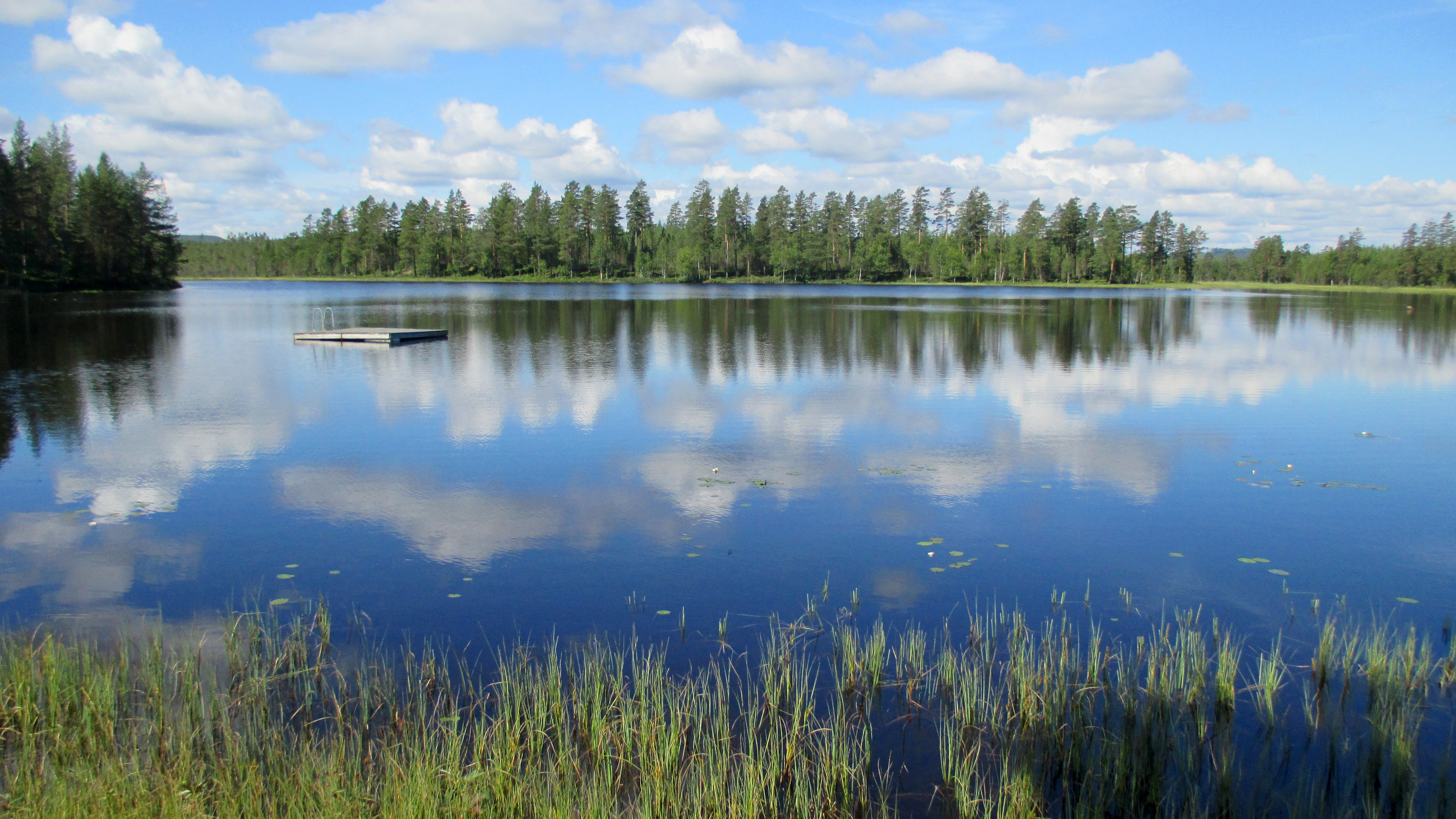 Sidsjön nära byn Källsjön, Ockelbo kommun, Gästrikland, Gävleborgs län, Sverige. Fotot är taget från norra kanten av badplatsen.